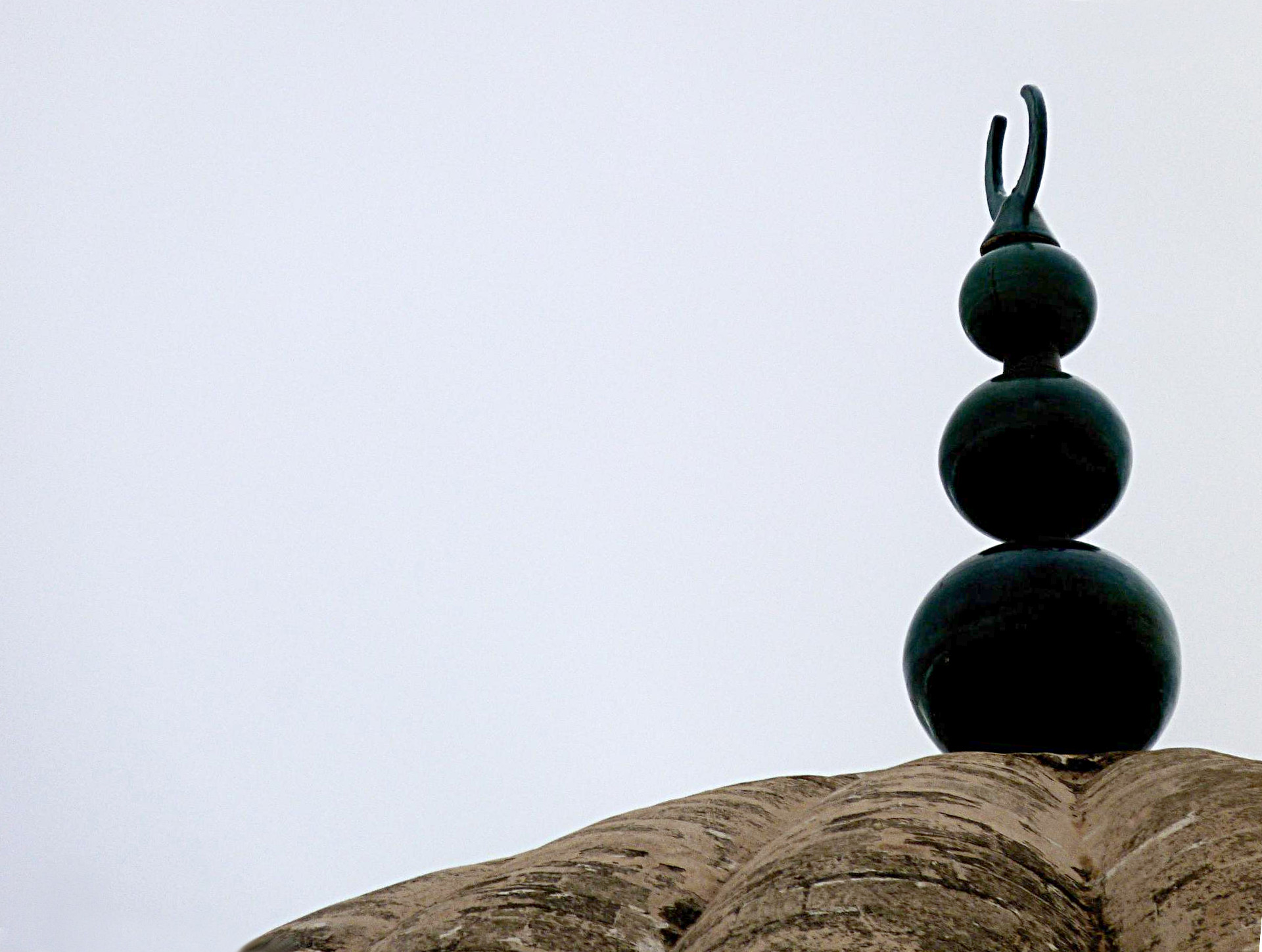 Trois boules superposées terminées par un croissant au sommet de la coupole du mihrab dans la Grande Mosquée de Kairouan, en Tunisie.